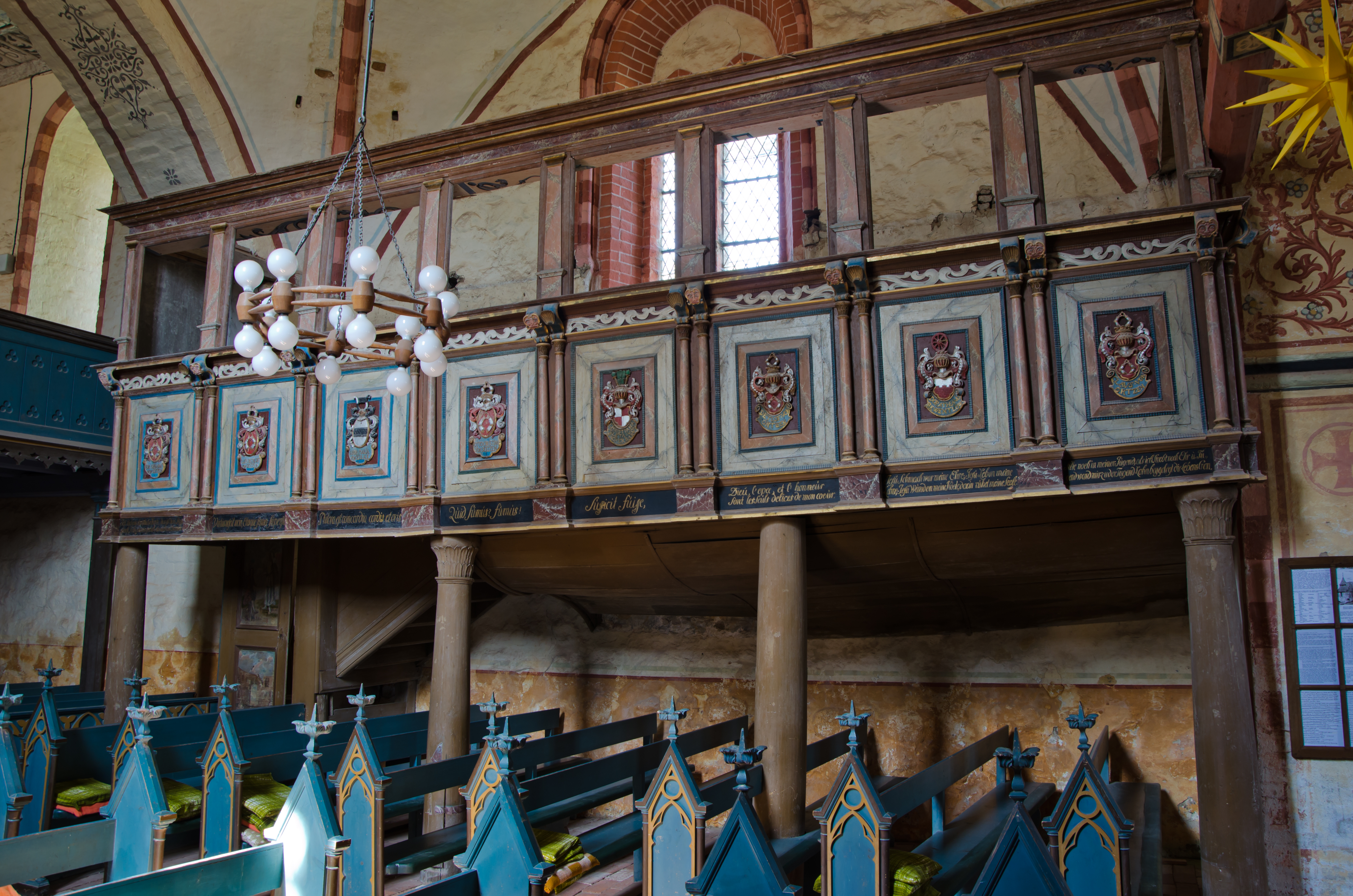 Hanstorf Kirche Loge mit verschiedenen Wappen